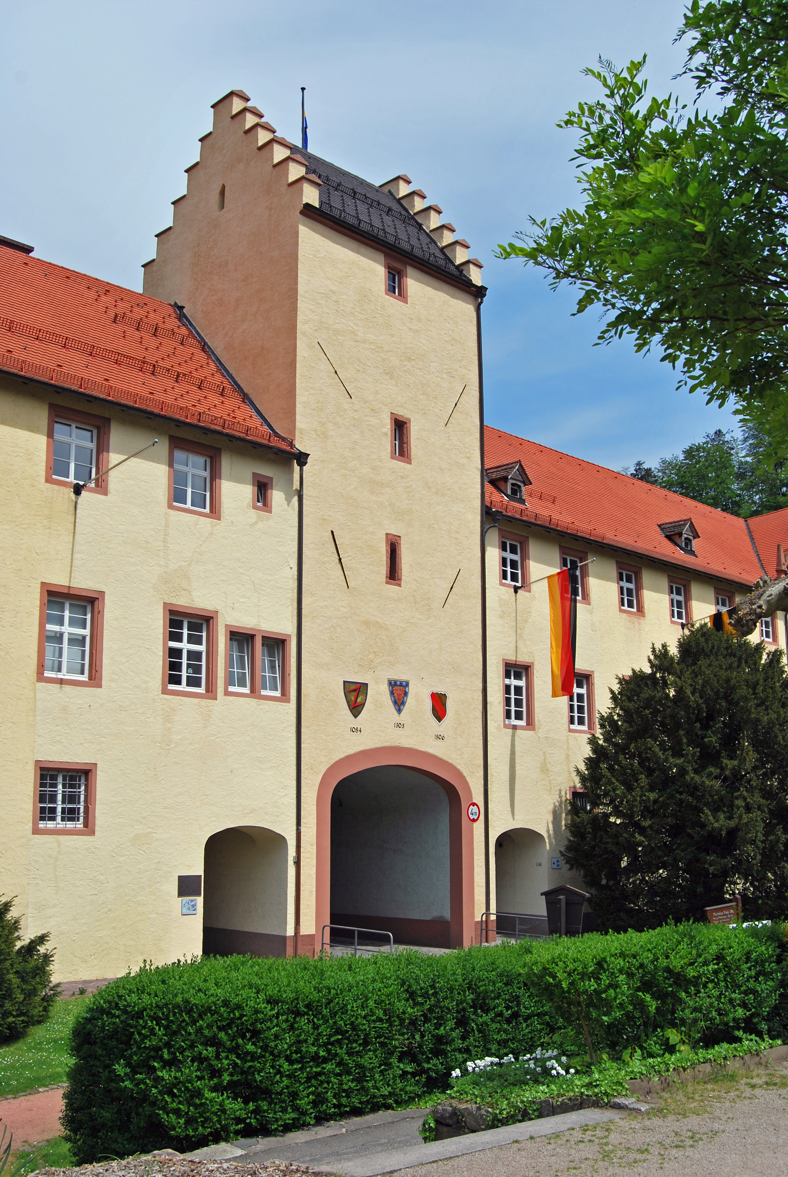 Schloss Wolfach